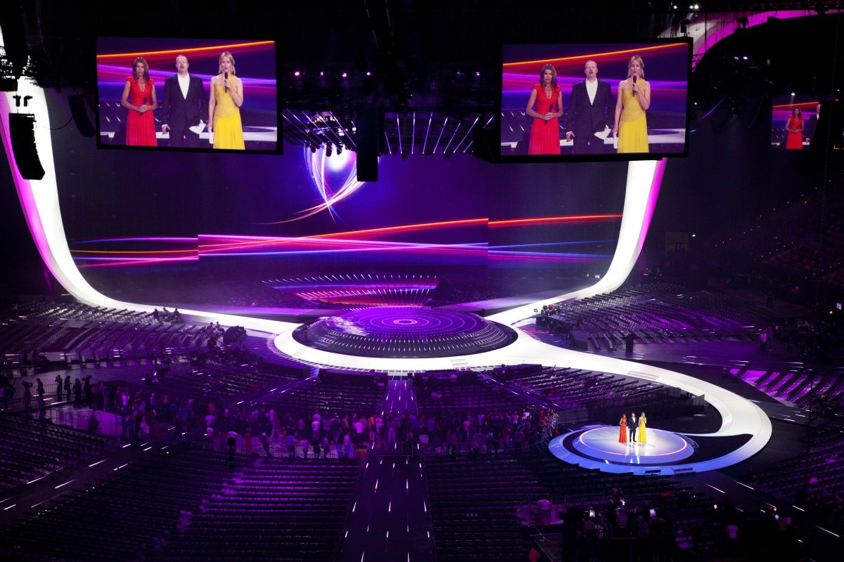 es el escenario del certamen de eurovisión 2011, circular con una pasadera que acaba en otro escenario circular mas pequeño con los presentadores, detrás está el icono de Eurovisión 2011